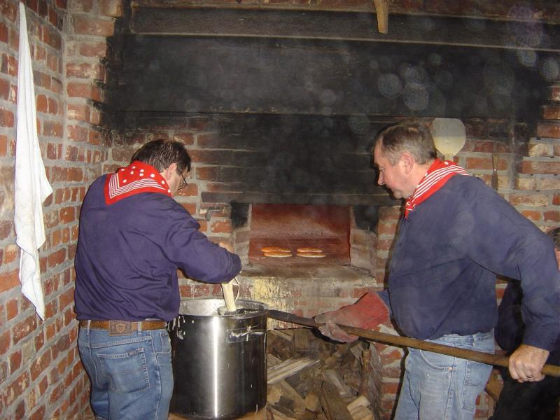 geutelingen worden gegoten